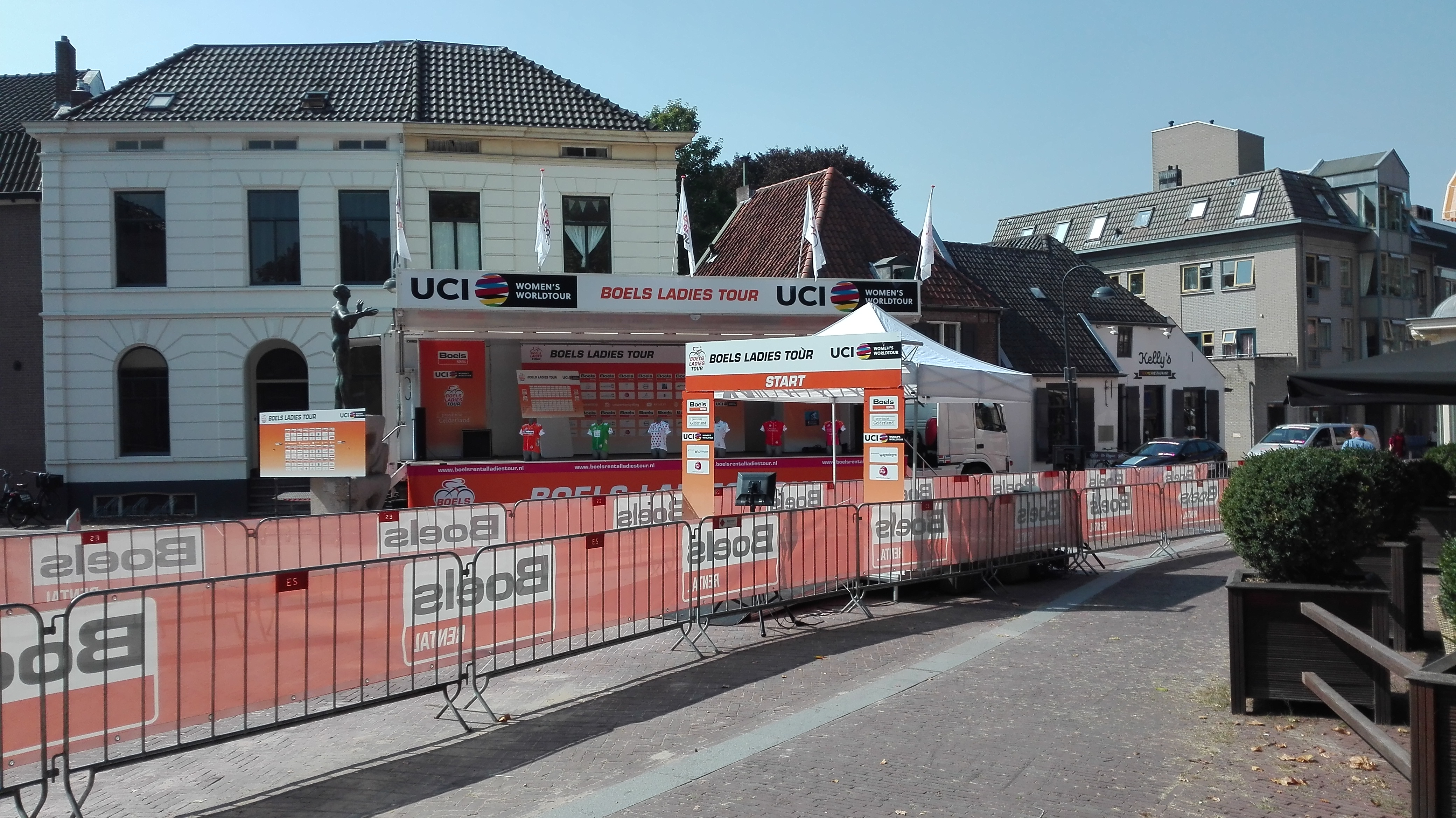 Boels Ladies Tour 2017, Wageningen - Prologue